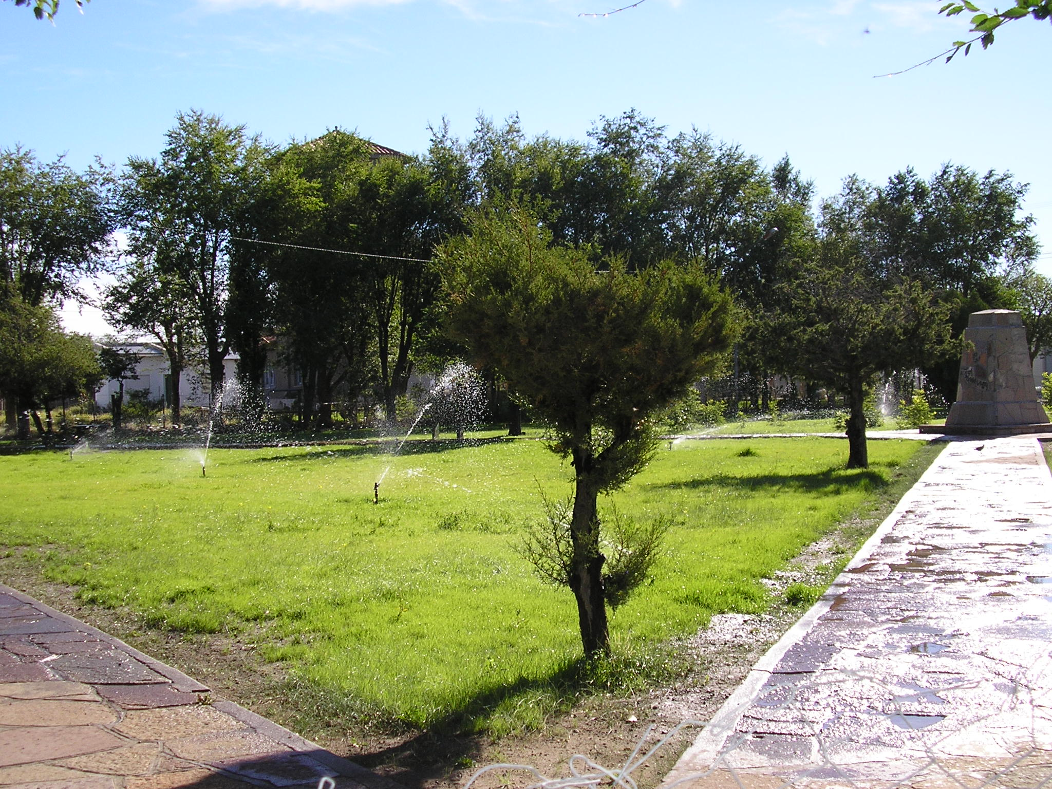 plaza sarmiento.Maquinchao